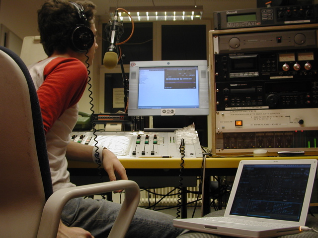 Artist Michael Bunsen broadcasting at Freies Radio für Stuttgart (99.7 FM) in Stuttgart, Germany.